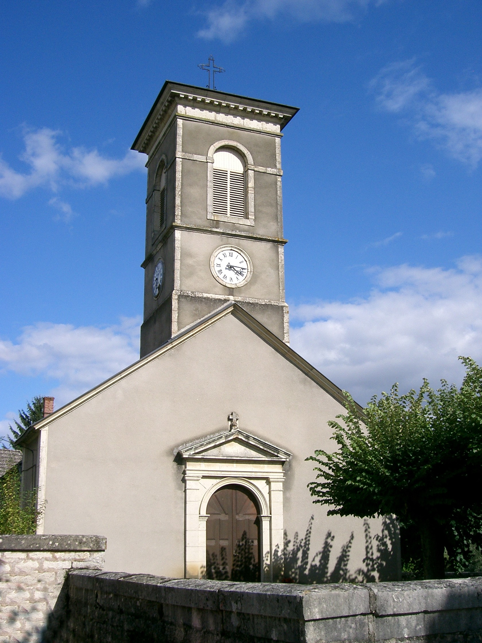 église du village d'Ecuelles (Saône et Loire - France)